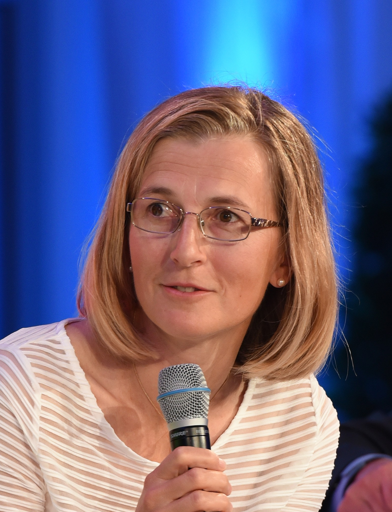 Monika Henzinger beim BE OPEN - Science & Society Festival des FWF